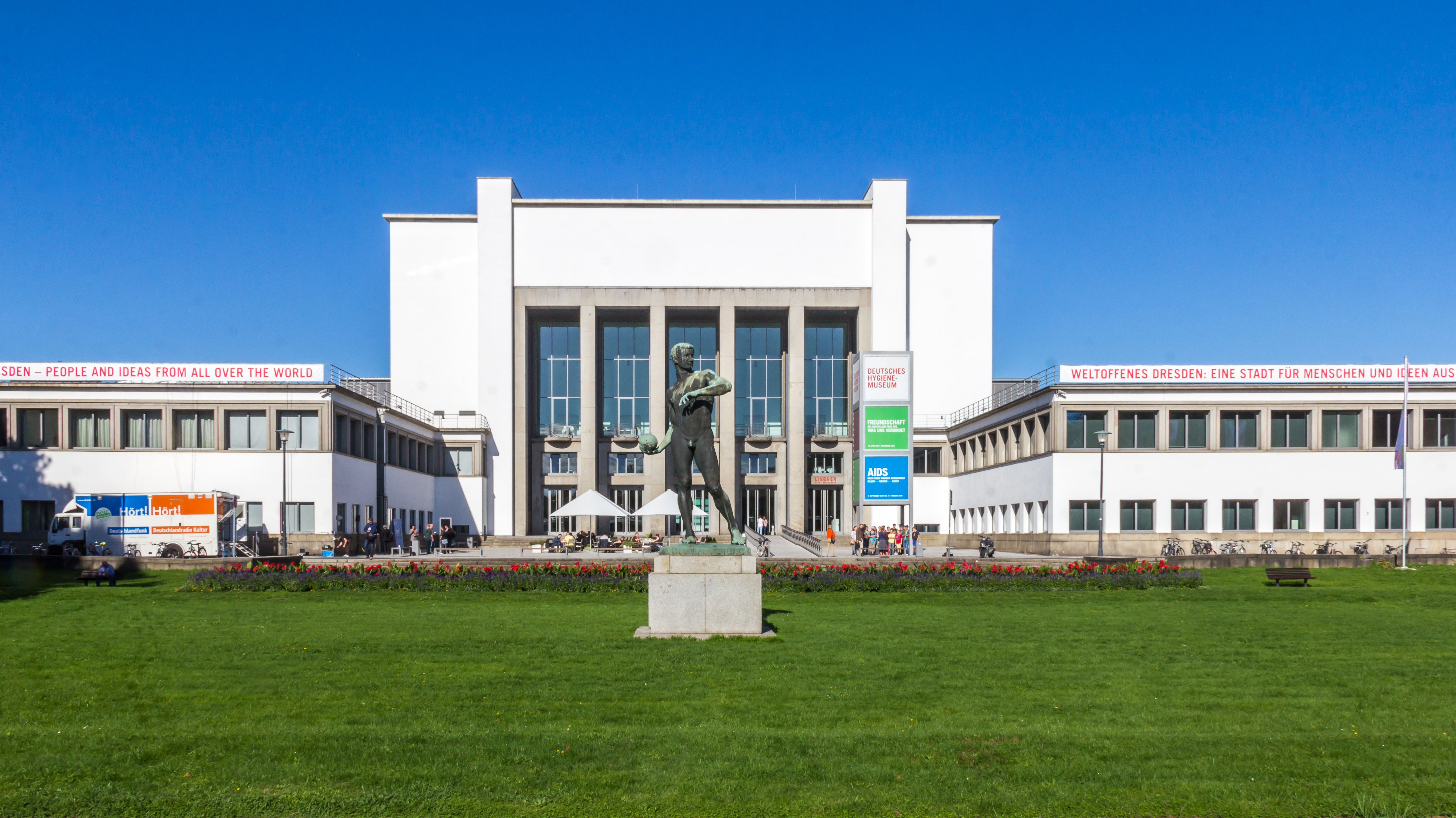 Deutsches Hygienemuseum, mit Plastik Ballwerfer von Richard Daniel Fabricius This is a photograph of an architectural monument.It is on the list of cultural monuments of Dresdener Stadtteil Altstadt I